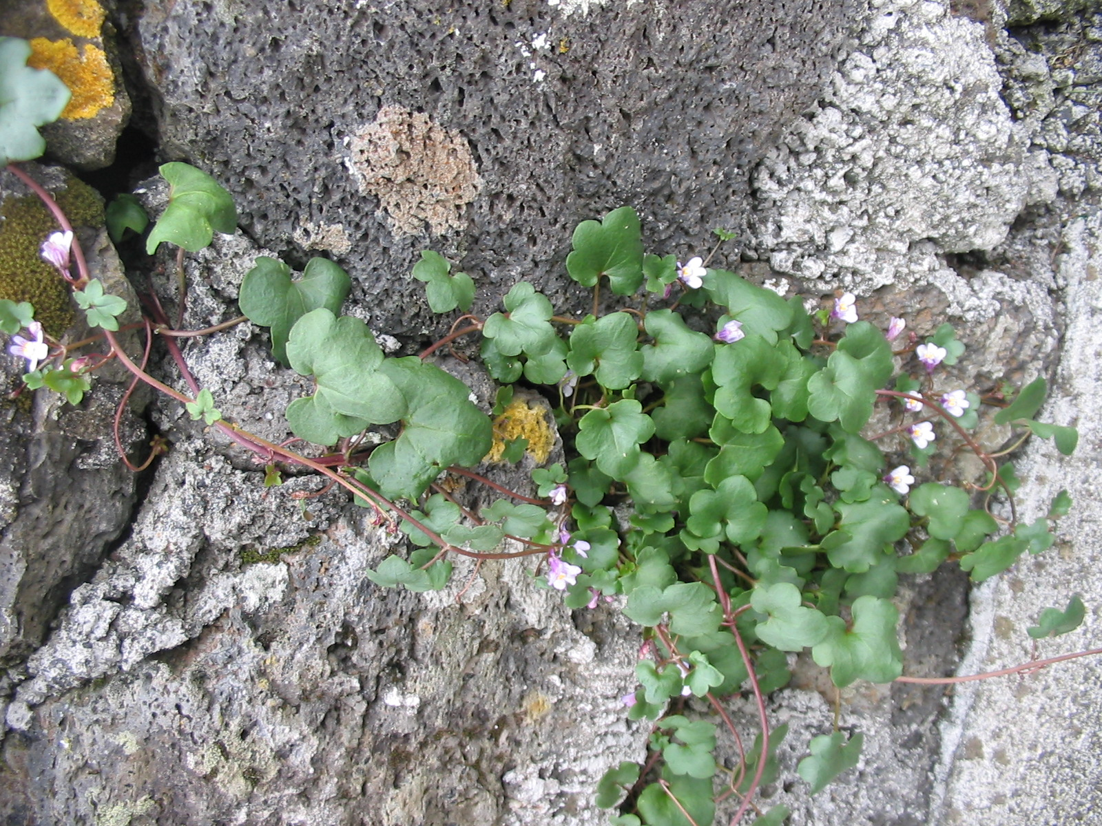 Mauer-Zimbelkraut (Cymbalaria muralis) - Habitus